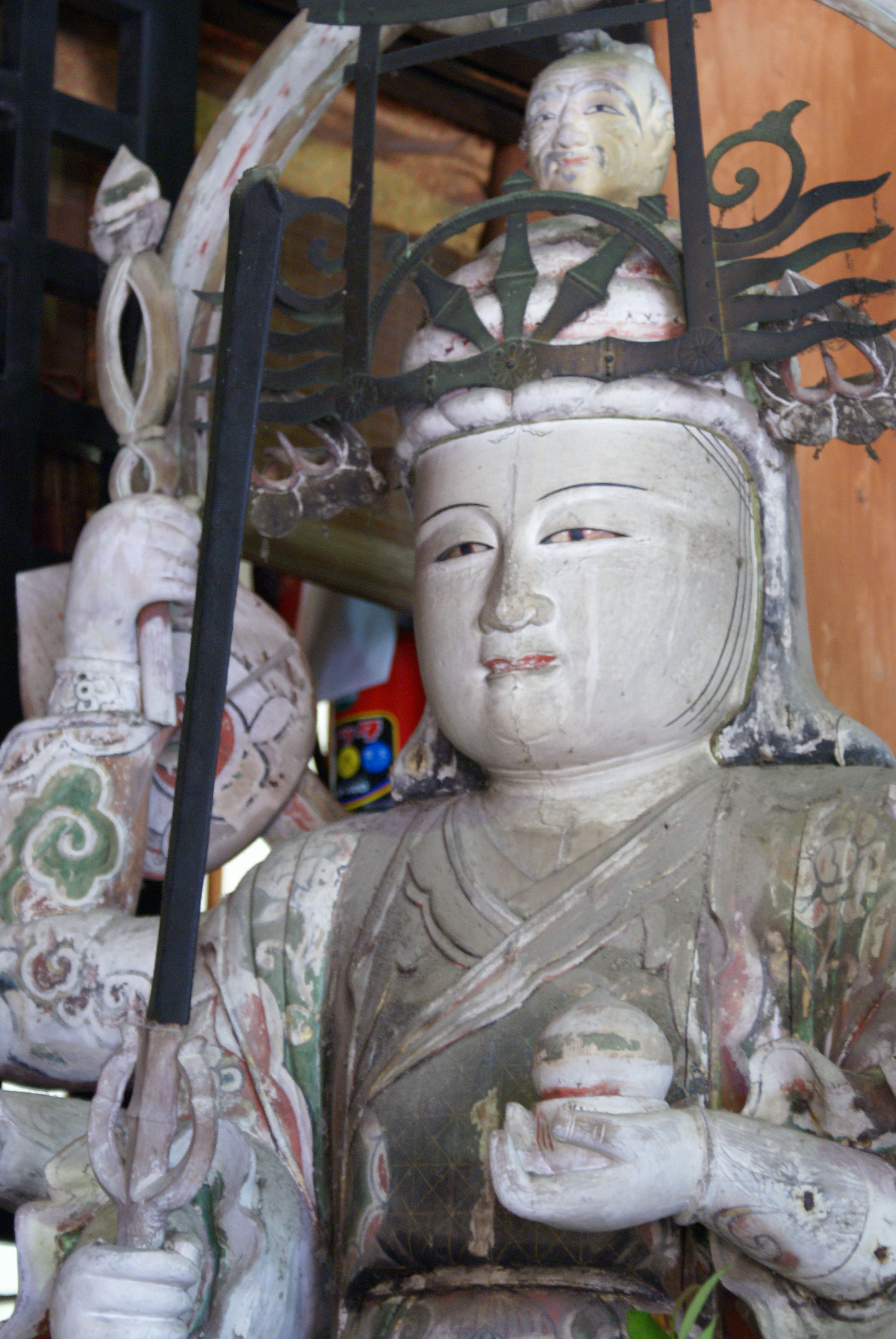 Hogonji in Nagahama, Shiga, Japan